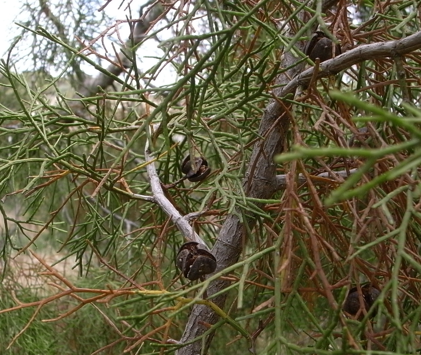 Tetraclinis articulata, Buskett Gardens, Malta Fructus